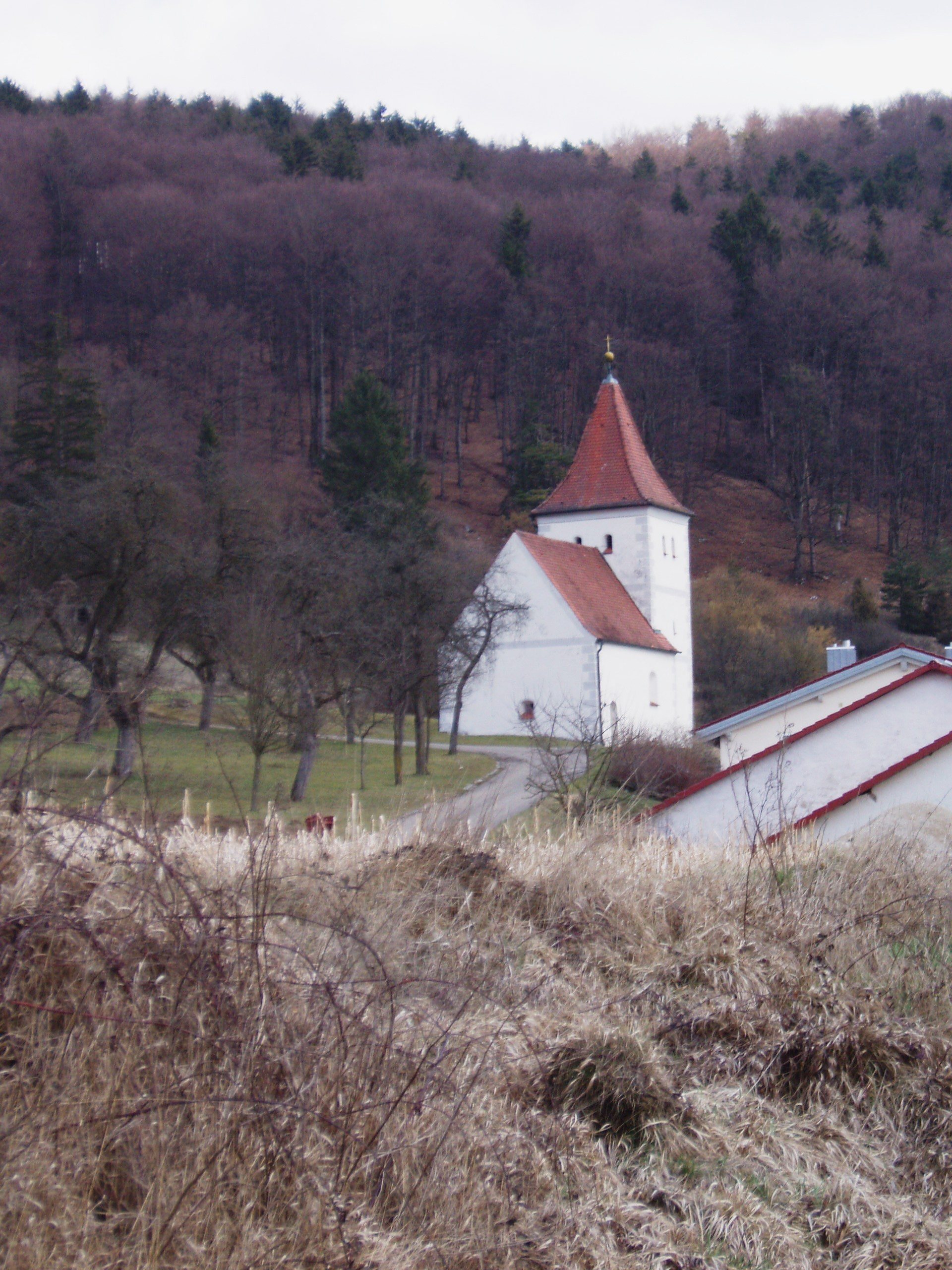 Isenbrunn_im_Landkreis_Eichstätt_Kirche_St._Laurentius